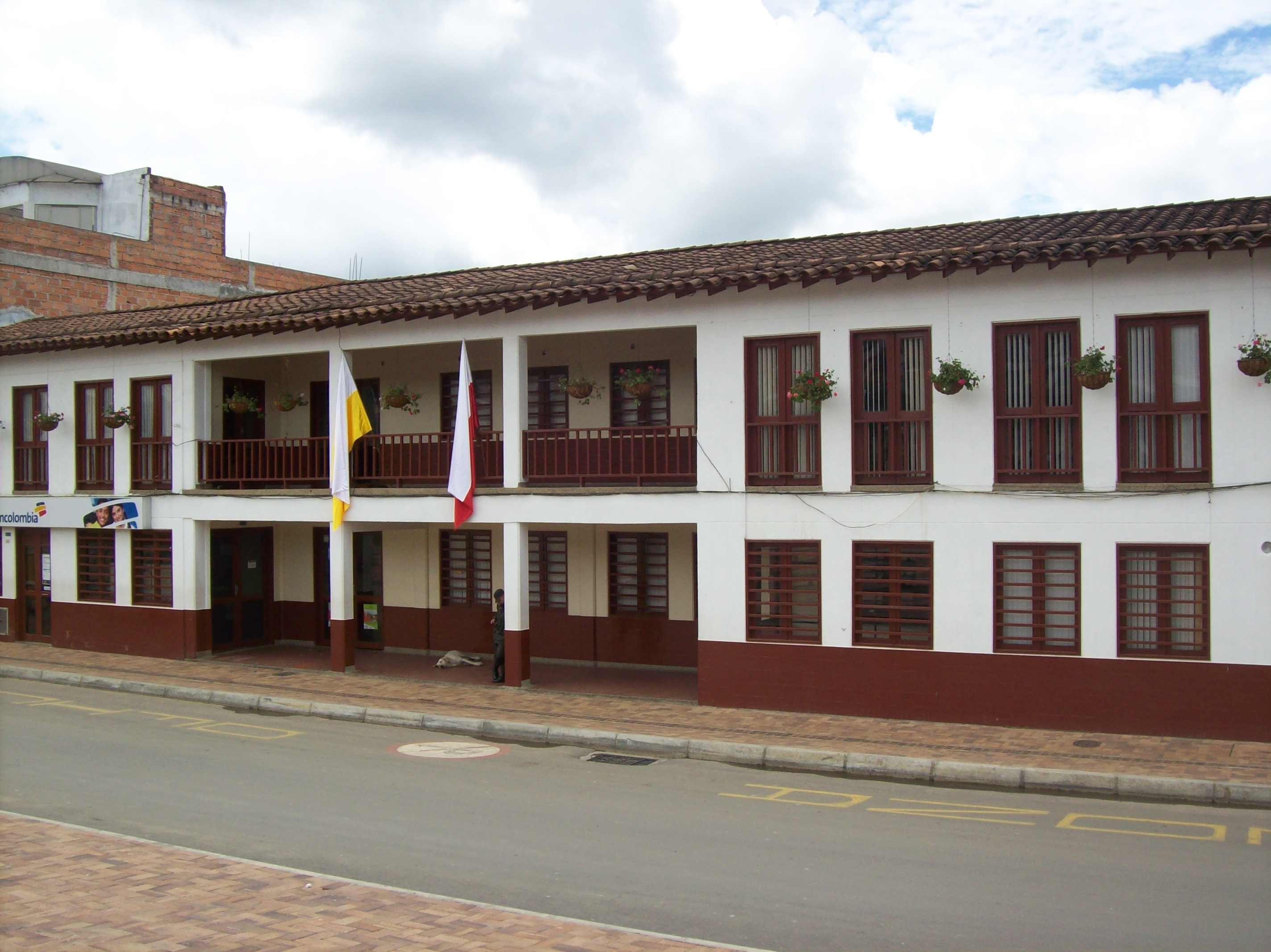 Alcaldía del municipio de San Pedro de los Milagros, Antioquia. Colombia.